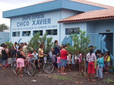 Centre spirite brésilien "Chico Xavier". Phrase sur la façade : "Etude, pratique et diffusion de l'Evangile de Jésus".